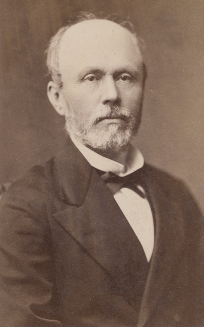 Sin fecha. Retrato de don Aníbal Pinto Garmendia, Pdte de Chile (1876-1881).